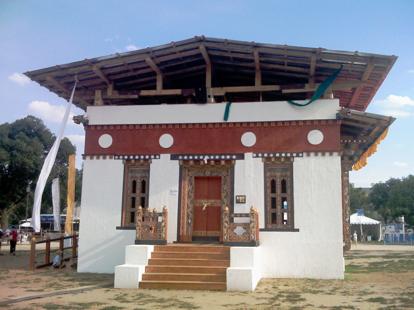 Foto de Butana templo, kiu iris al UTEP en usona teksaso.